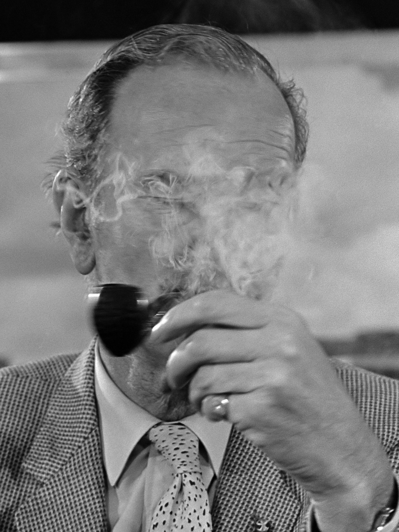 Vanmorgen keerde Van der Klaauw terug van reis naar Koeweit en Qatar, Van der Klaauw op Schiphol 6 januari 1981